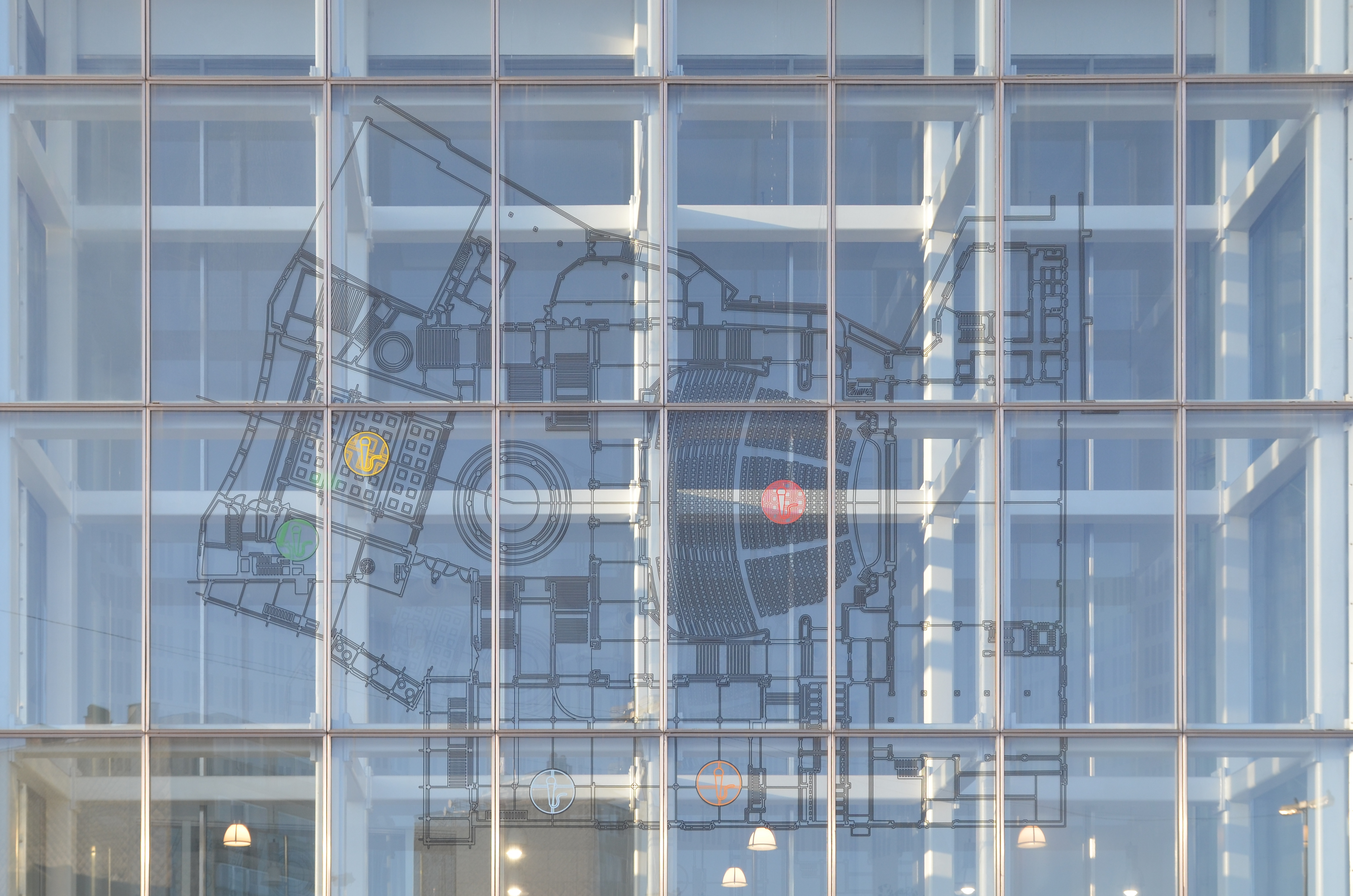 Palais des beaux-arts de Charleroi - plan de l'édifice dessiné sur la façade vitrée de l'extension.